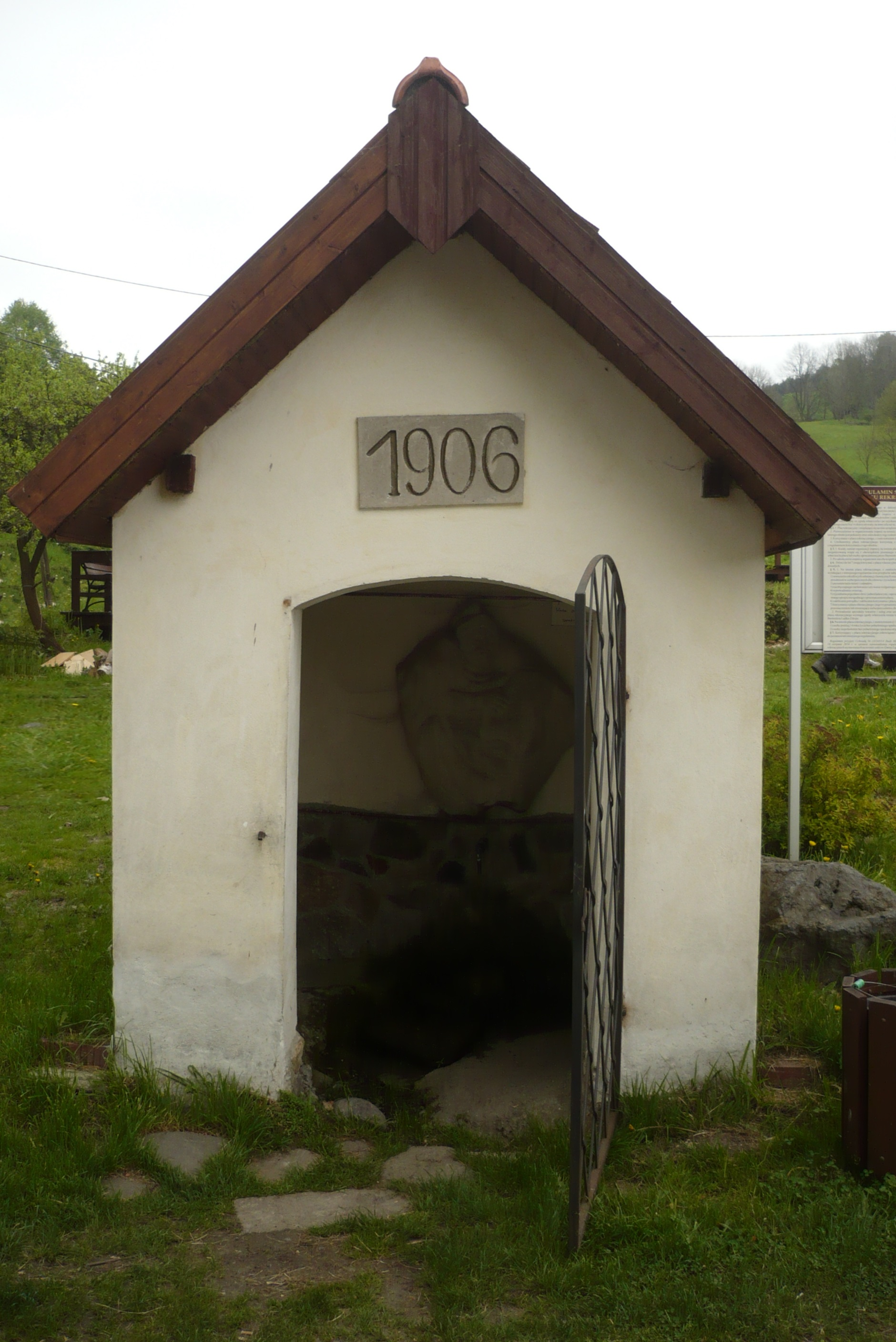 Lutynia. Źródło